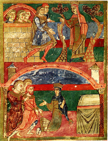 Scènes de la vie de sainte Radegonde. Vie de sainte Radegonde, XIème siècle. Manuscrit 250. Bibliothèque municipale de Poitiers.